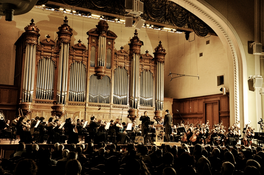 Moskova (Rusya) Turnesinden